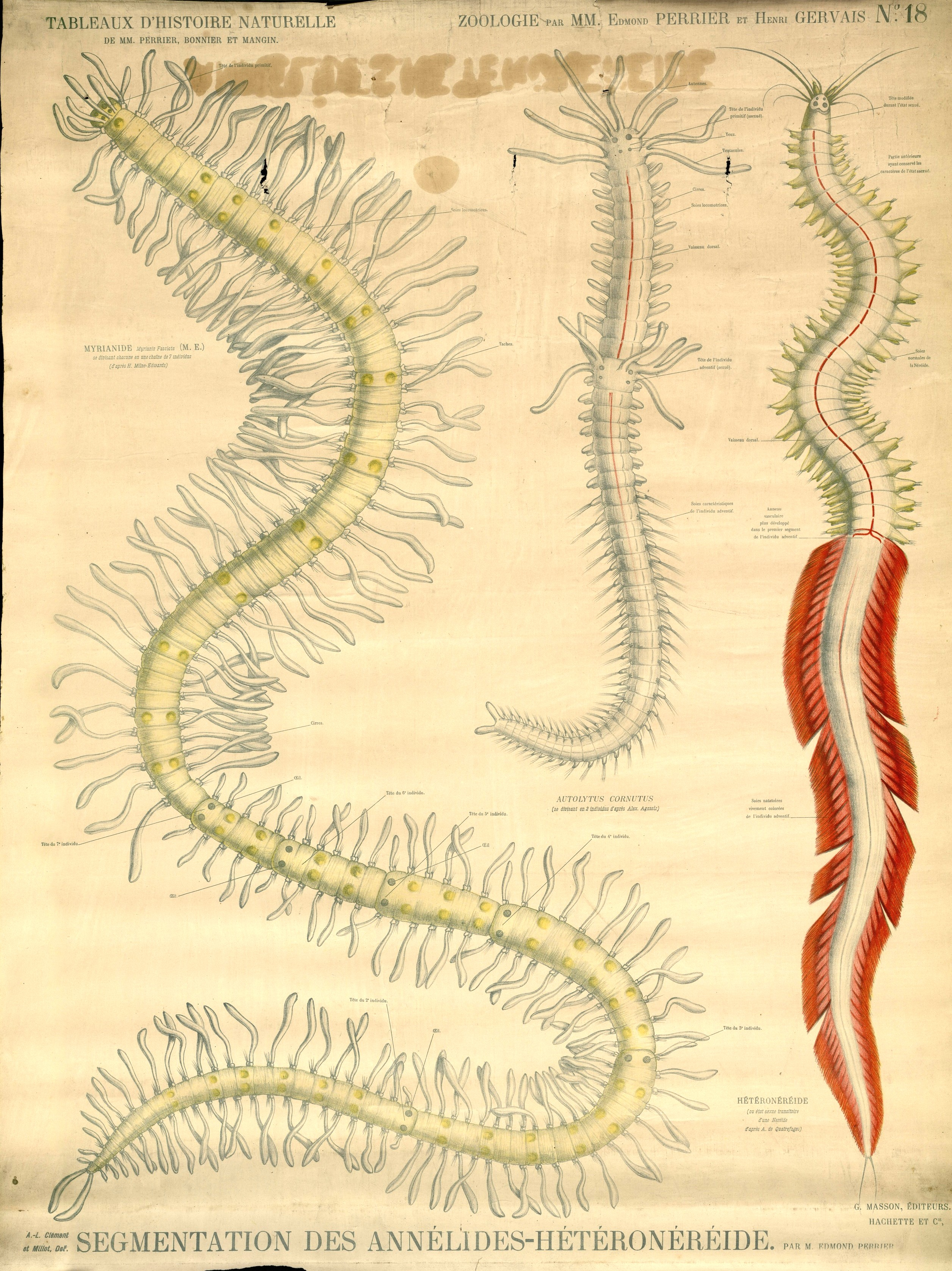 Segmentation des annélides-hétéronéréides. Bibliothèque Numérique de l'Université d'Artois. Retrieved on 27 March 2016.